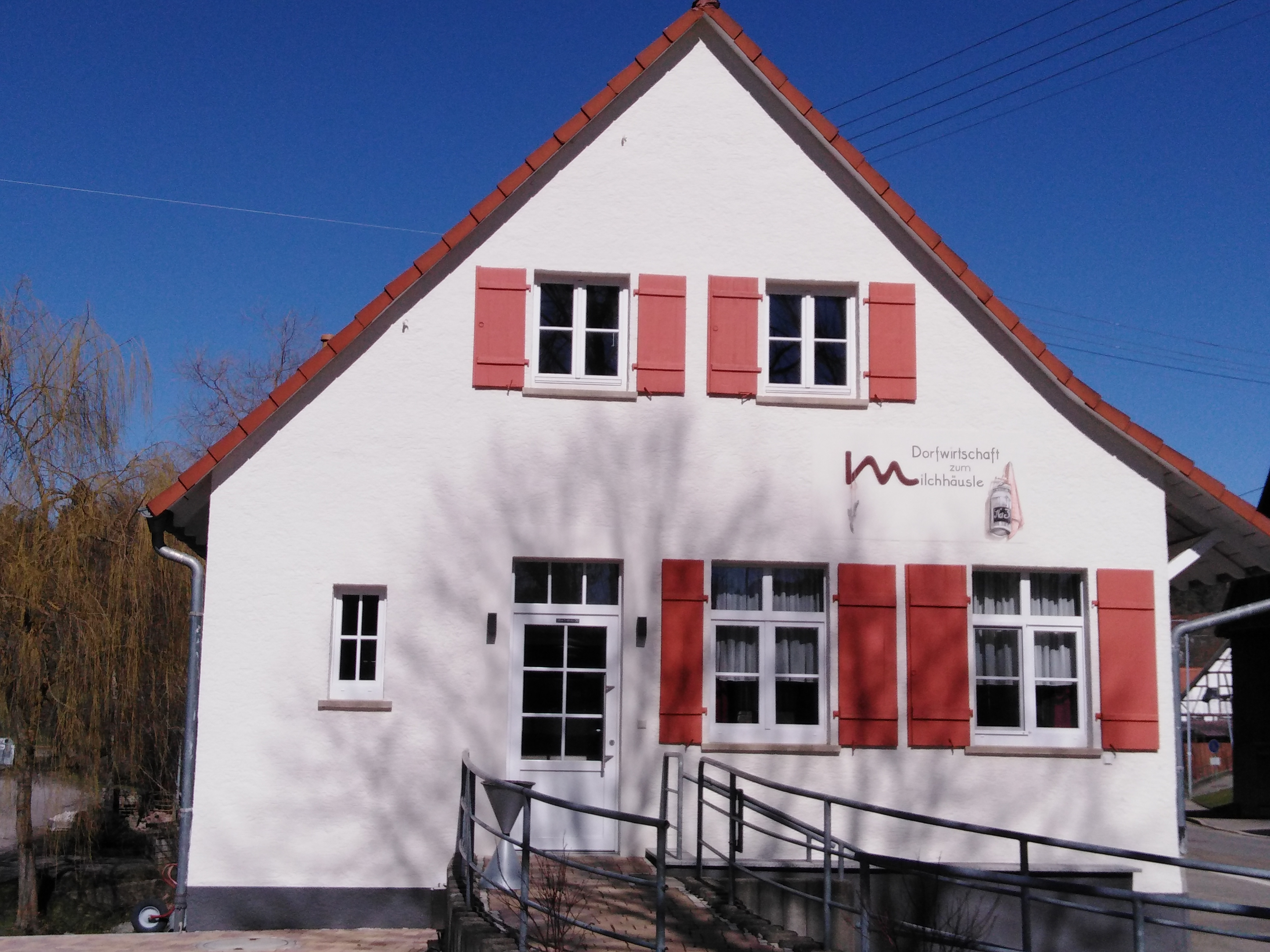 Zur Dorfwirtschaft umgebautes Milchhäusle in Stetten ob Rottweil